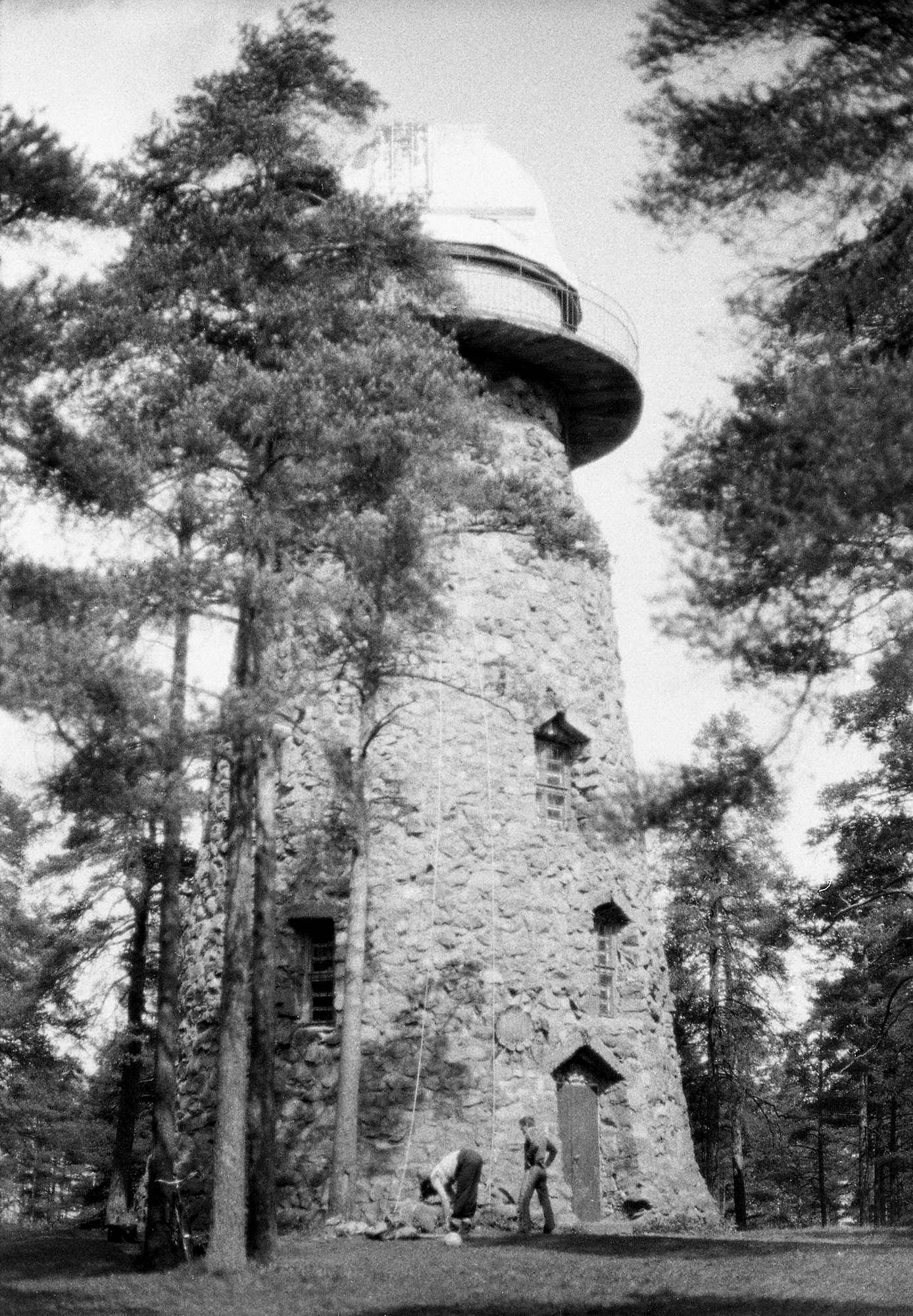 Tallinna Tähetornil alpinistid 72